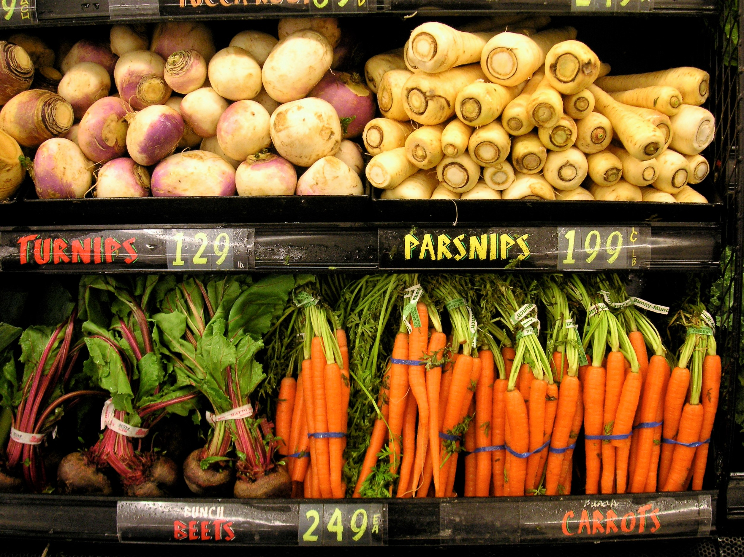 Angebot an verschiedenem Wurzelgemüse in einem Lebensmittelmarkt (von oben links im Uhrzeigersinn): Speiserüben, Pastinaken, Karotten, Rote Bete.